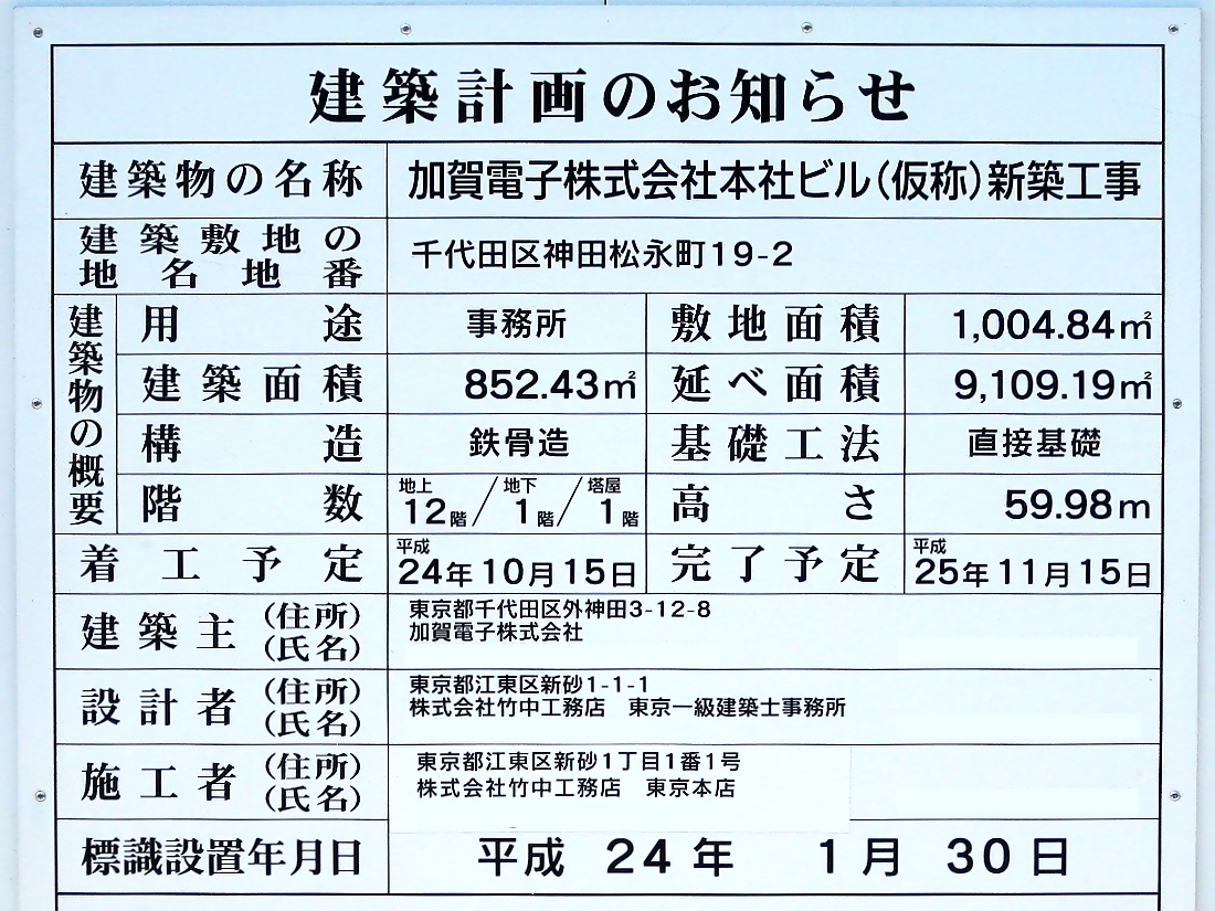 加賀電子本社ビル 建築計画のお知らせ （東京都千代田区神田松永町19番の2） 2013年3月24日撮影